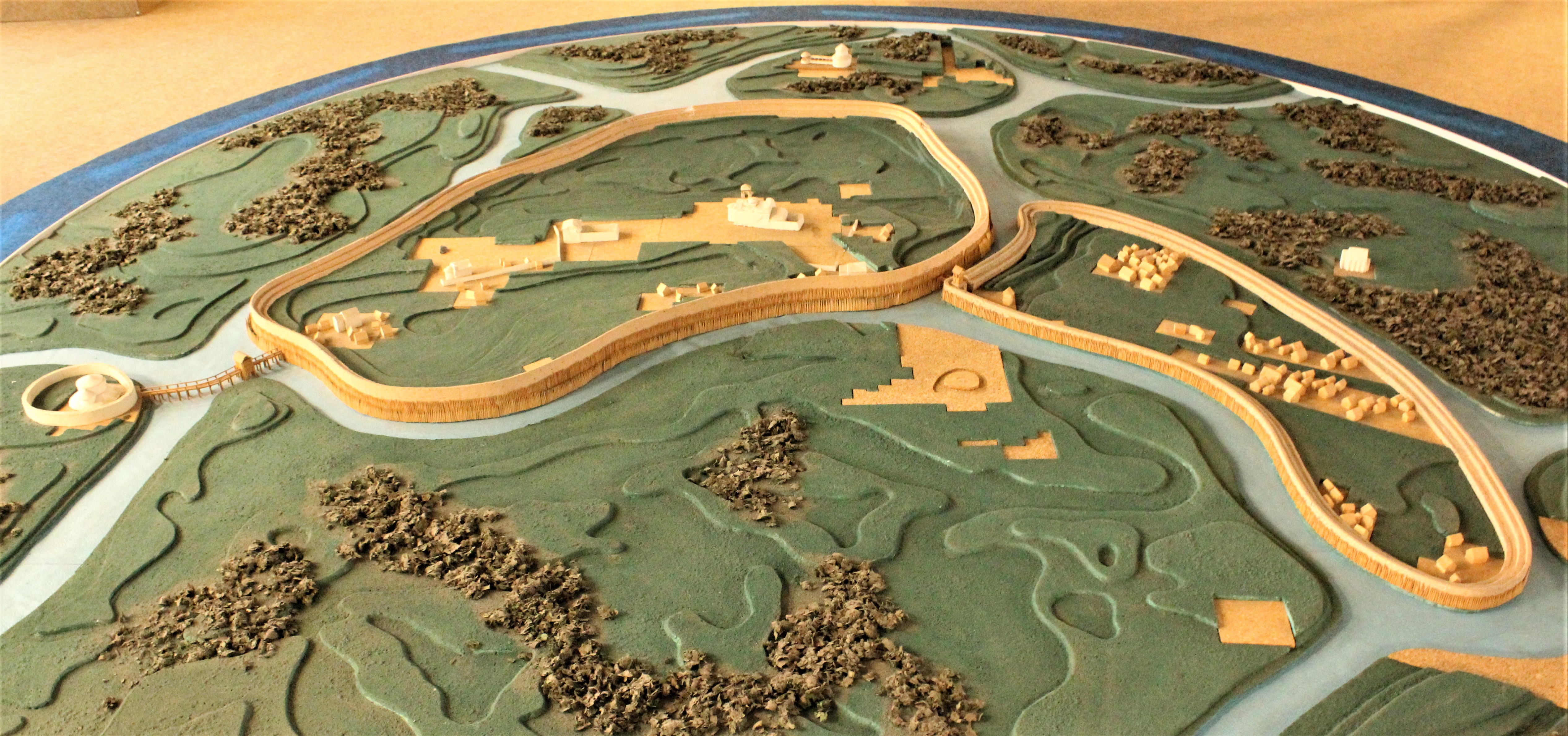 Velkomoravské hradiště Mikulčice